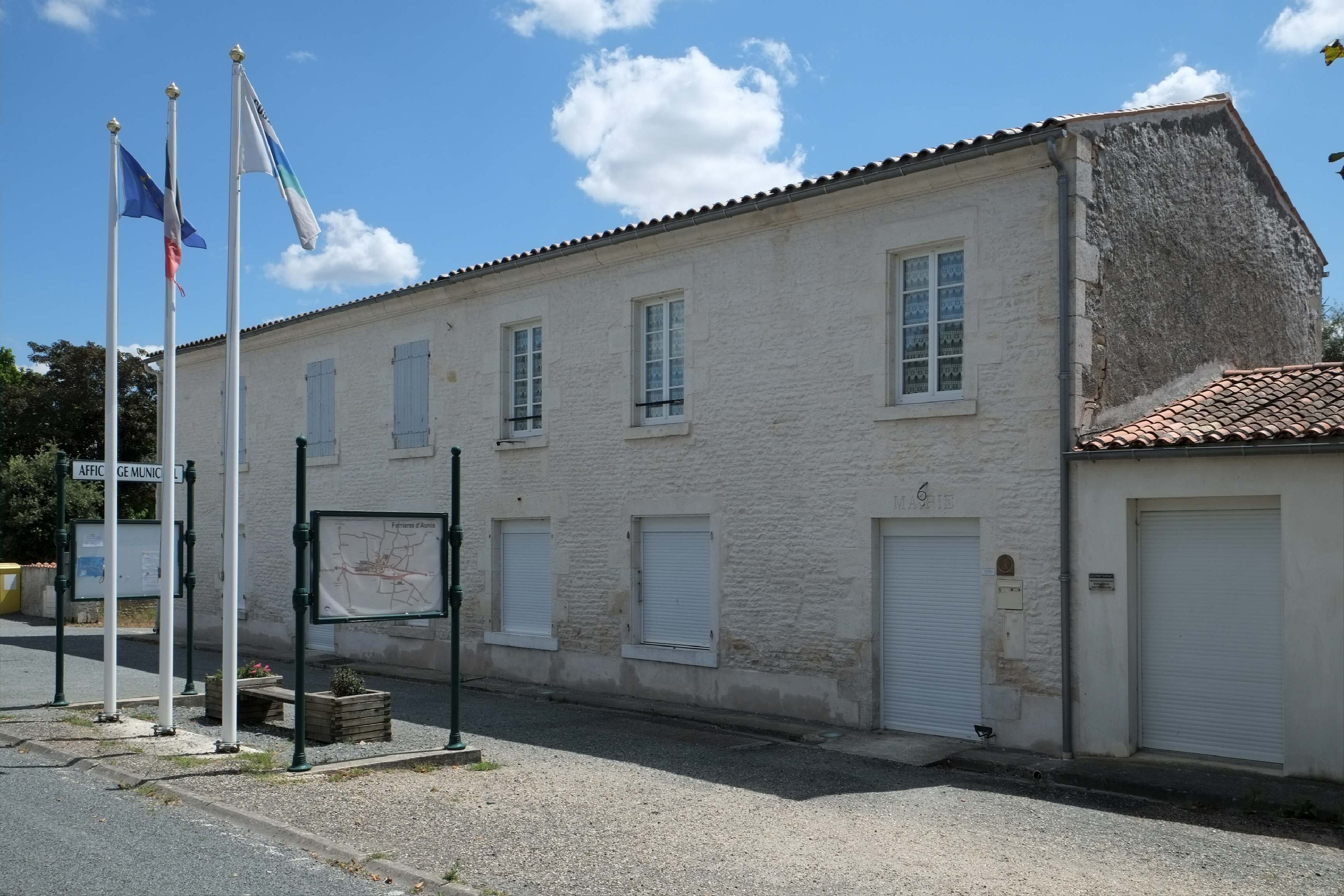 Mairie Ferrières Charente-Maritime France